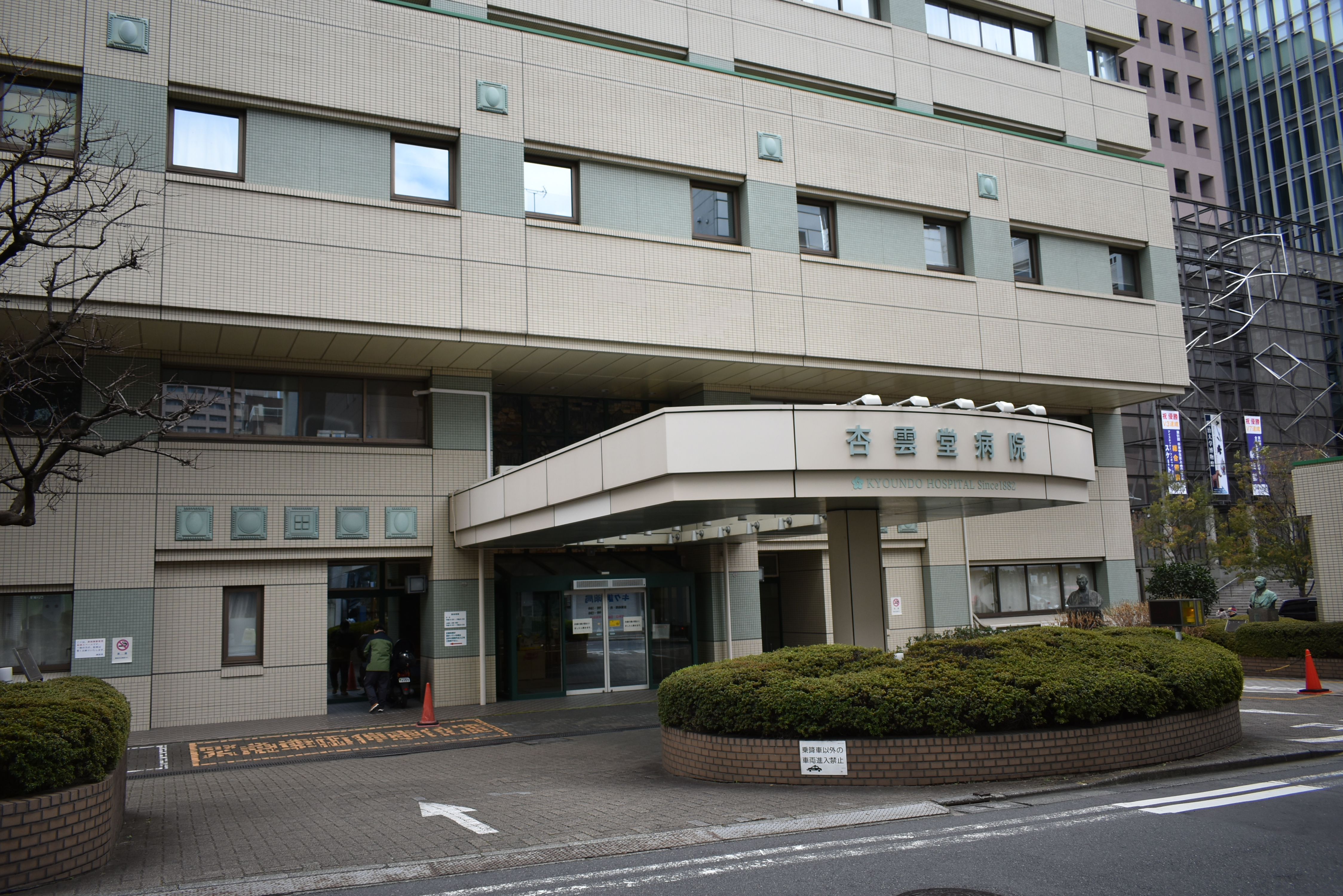 杏雲堂病院 Nikon D3400